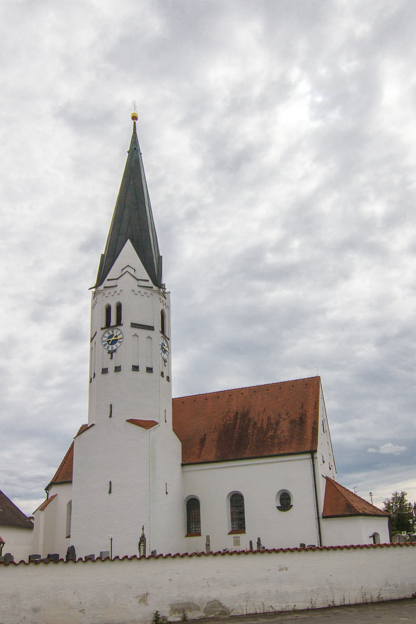 2. Hälfte 15.Jahrhundert, Umgestaltung 1699; mit Ausstattung.This is a photograph of an architectural monument.